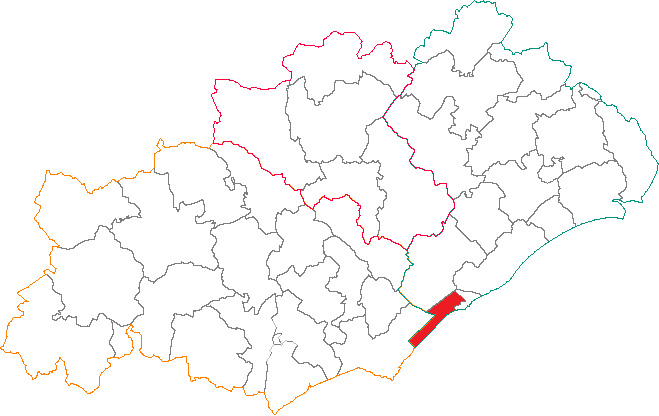 Situation du canton dans le département de l'Hérault.